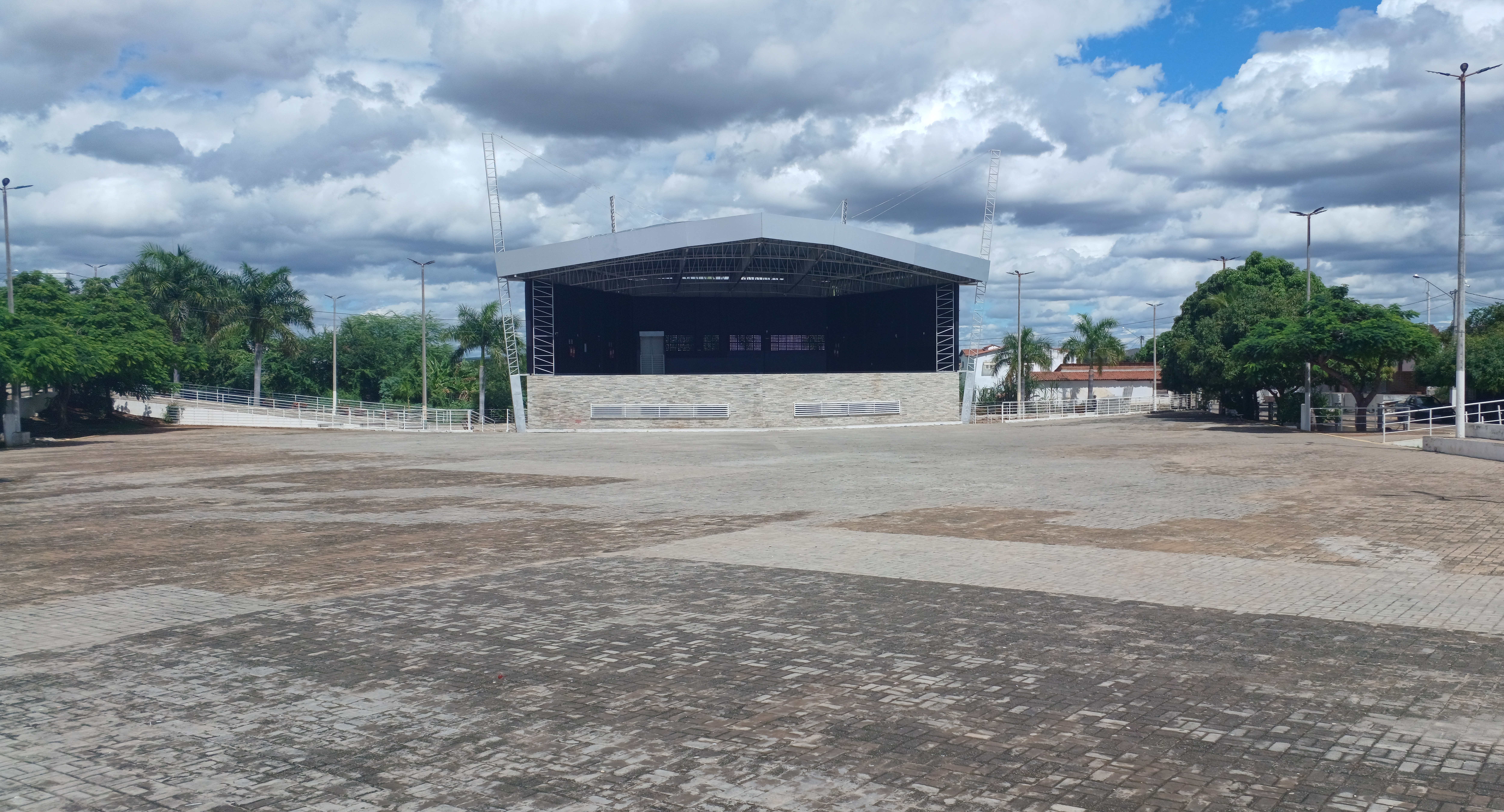 Praça de eventos de Major Sales, Rio Grande do Norte (Brasil)